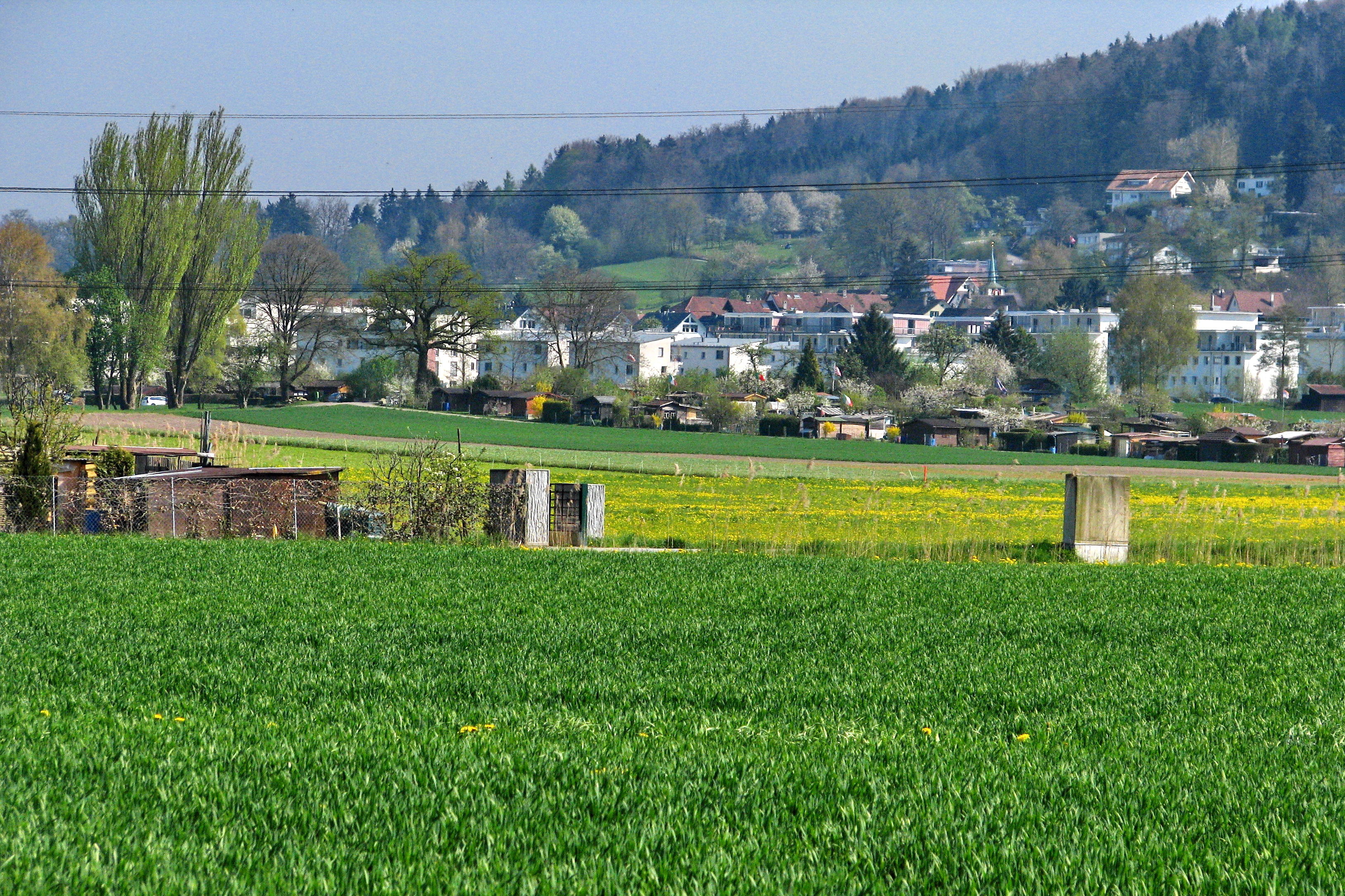 Fällanden as seen from Glatt river